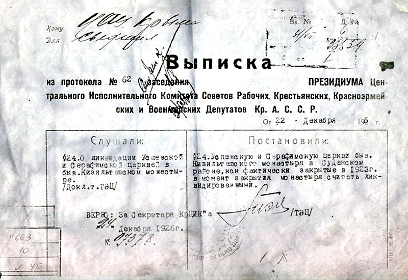 Выписка из протокола заседания президиума ЦИК Крымской АССР о ликвидации Кизилташского монастыря.